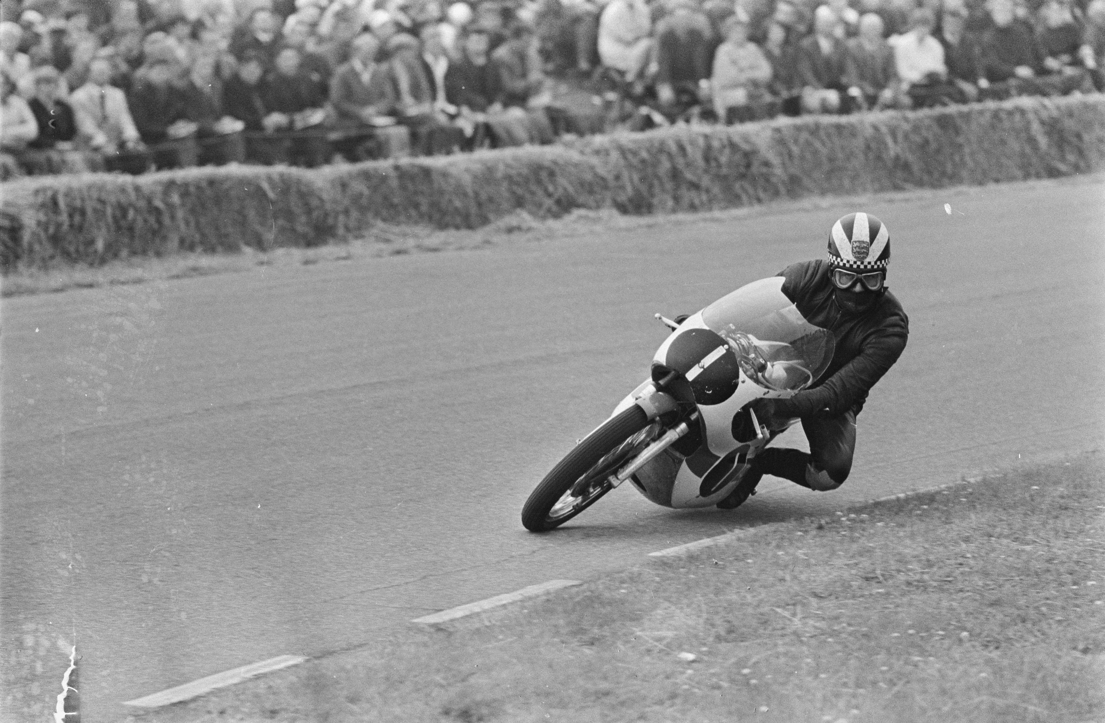 Collectie / Archief : Fotocollectie Anefo Reportage / Serie : TT Assen 1967 Beschrijving : 250cc klasse. Phil Read in aktie (winnaar) Datum : 24 juni 1967 Locatie : Assen Trefwoorden : motorsport Persoonsnaam : Read, Phil Fotograaf : Koch, Eric / Anefo Auteursrechthebbende : Nationaal Archief Materiaalsoort : Negatief (zwart/wit) Nummer archiefinventaris : bekijk toegang 2.24.01.05 Bestanddeelnummer : 934-6504